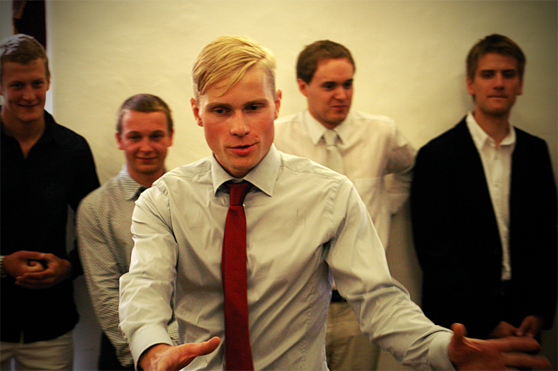 Kristo Viiding